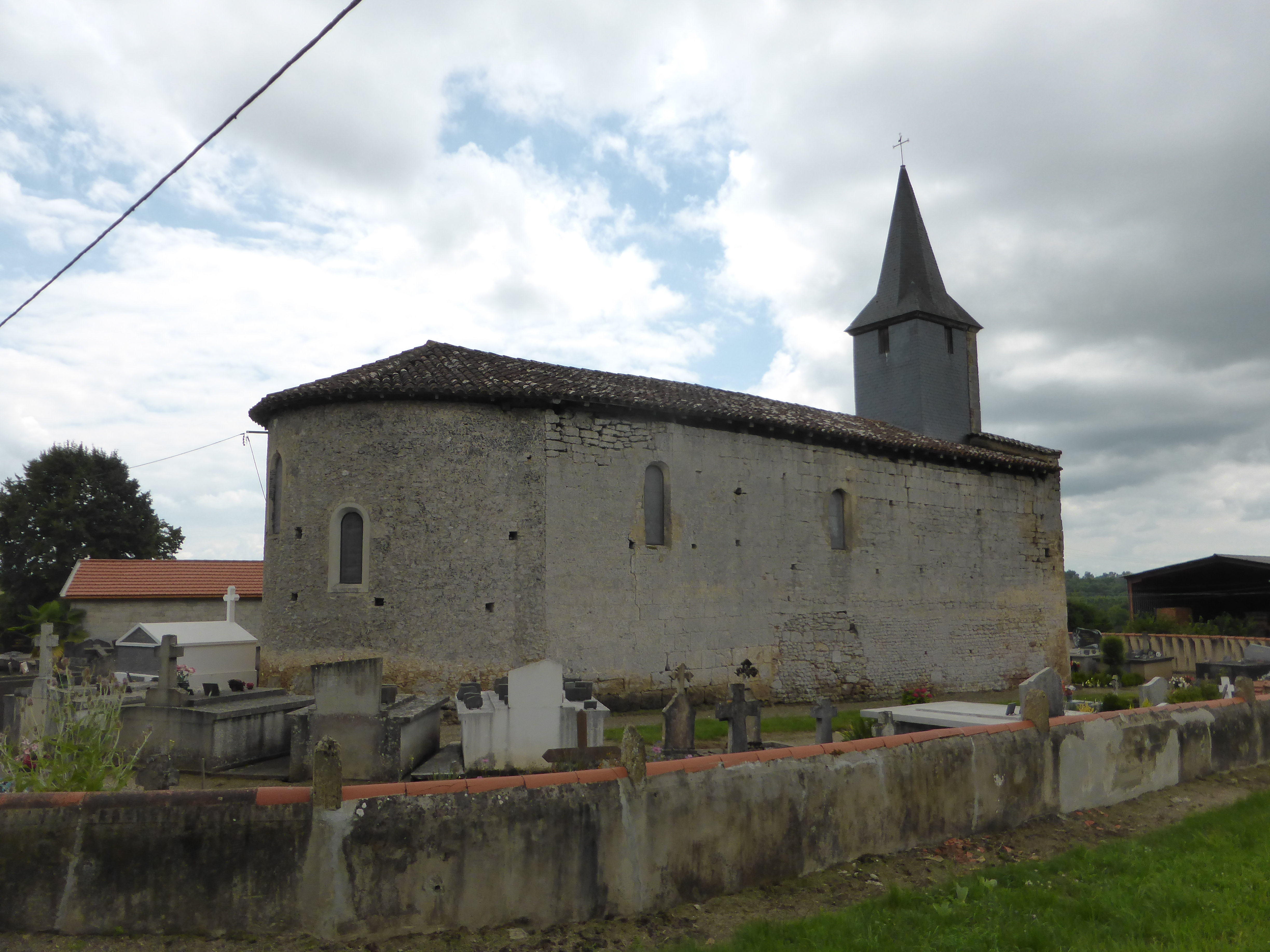 Église de Lias d'Armagnac, dans le Gers.